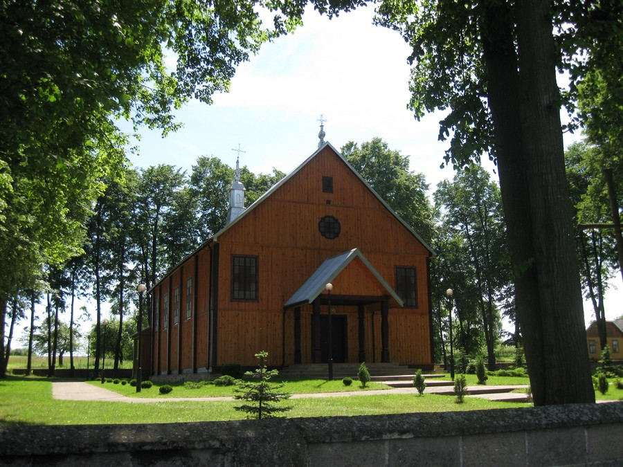 Kościół parafialny pw. MB Częstochowskiej w Tabędzu.